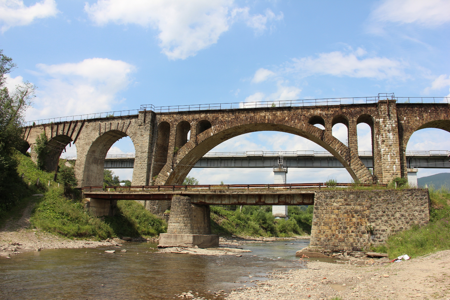 Залізничні кам'яні арочні мости Ворохти